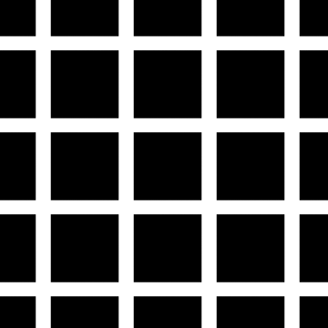 Nicu Mihai illusion